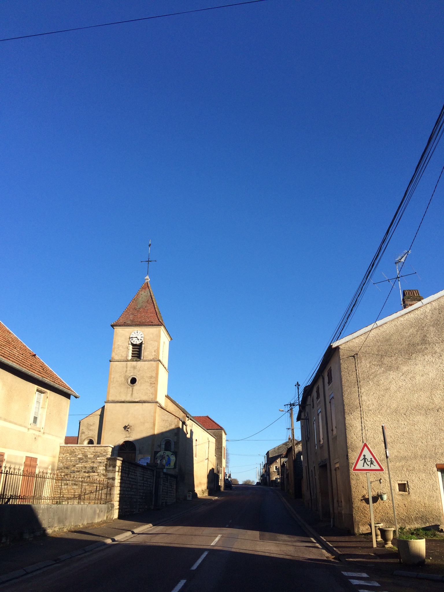 Eglise Notre Dame en traversée d’Orville (Côte d’Or)